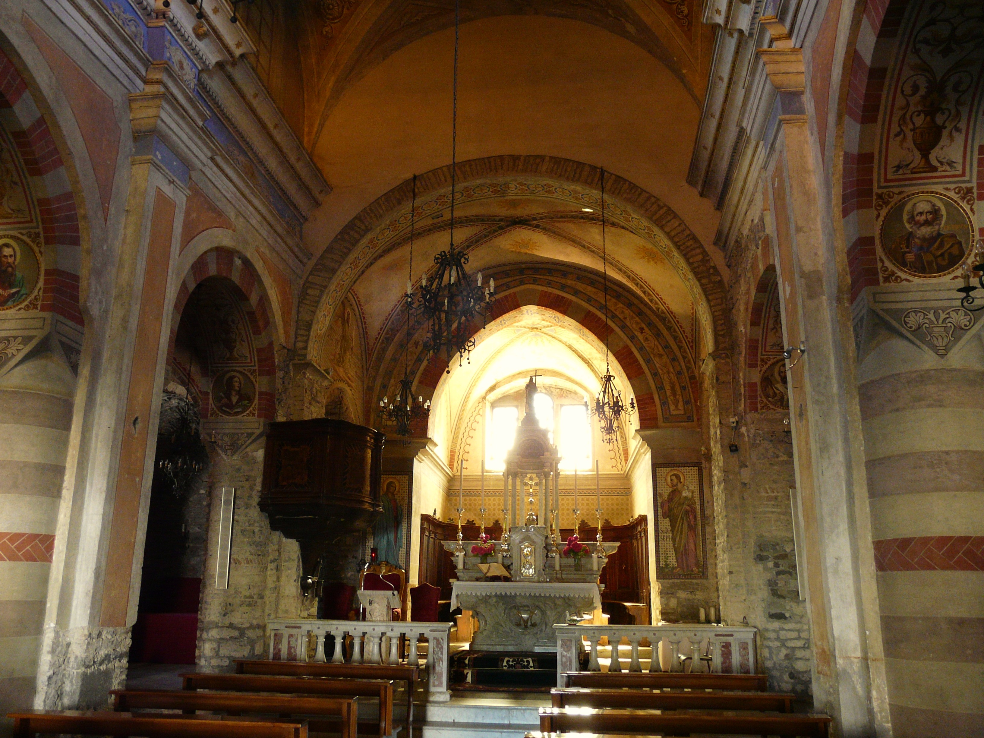 Navata centrale della pieve di Santa Maria Assunta di Fabbrica Curone, Piemonte, Italia